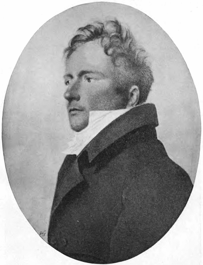 Książę Michał Gedeon Radziwiłł